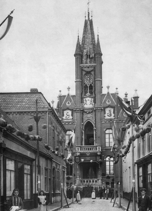 Oude stadhuis Eindhoven in 1904 versierd ter ere van de komst van Koningin Wilhelmina en Prins Hendrik. Foto is genomen vanaf de Markt door de Jan van Hooffstraat. Gebouw stond aan de Rechtestraat.